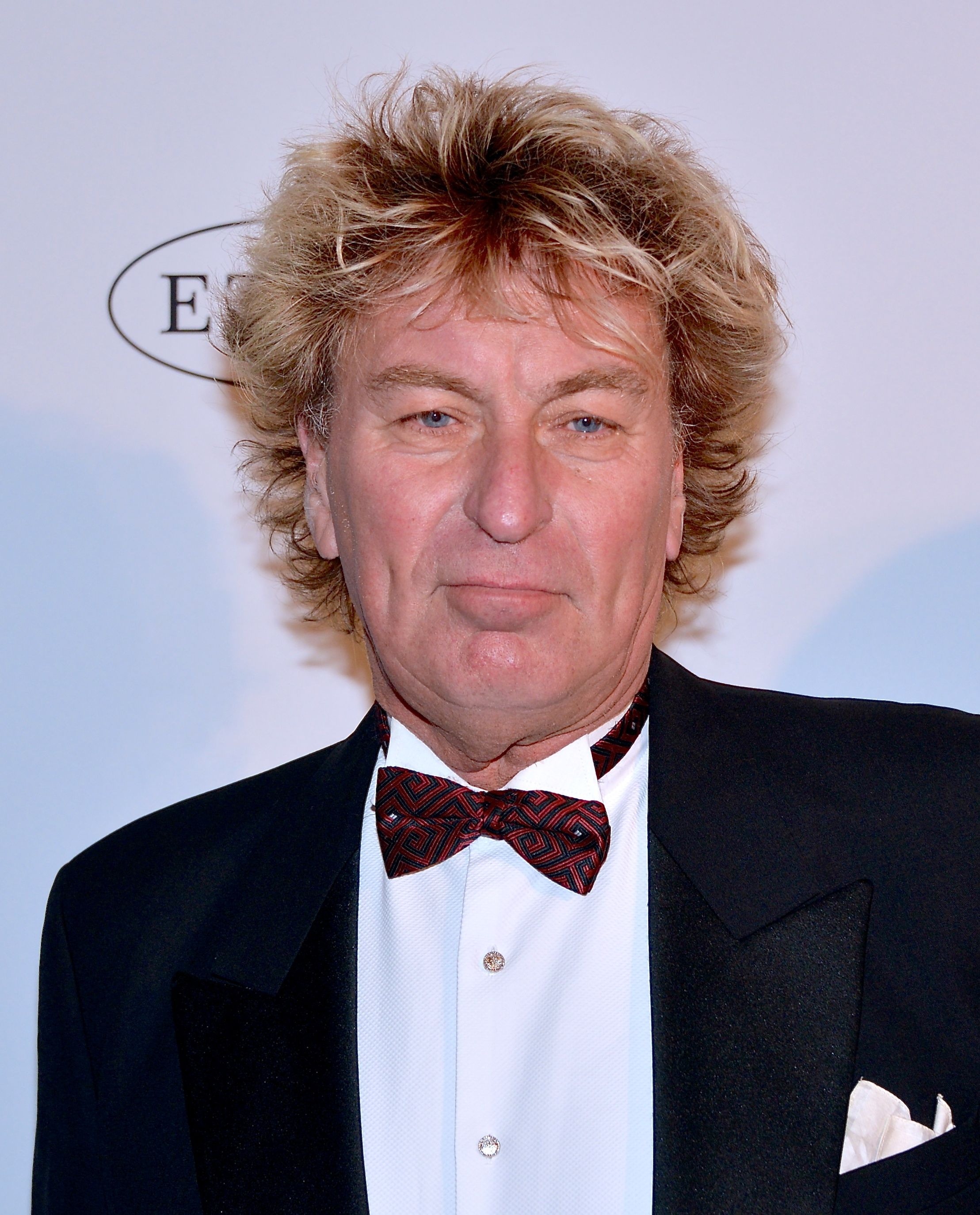 Richard Hobert på Guldbaggegalan den 21 januari 2013.